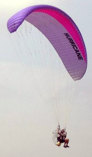 Paramoteur Monoplace en 2003 Auteur Xavier Bonnafous (Xulin)